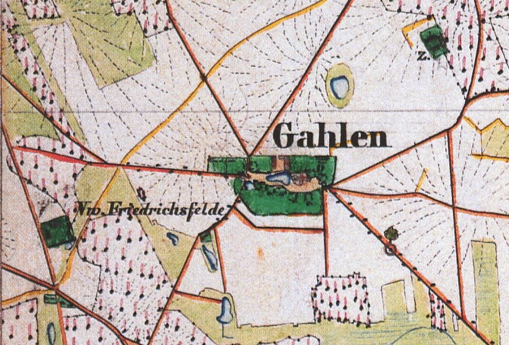 Gahlen, Ortsteil von Vetschau/Spreewald, Landkreis Oberspreewald-Lausitz, Brandenburg, Ausschnitt aus dem Urmesstischblatt 4250 Vetschau/Spreewald von 1846